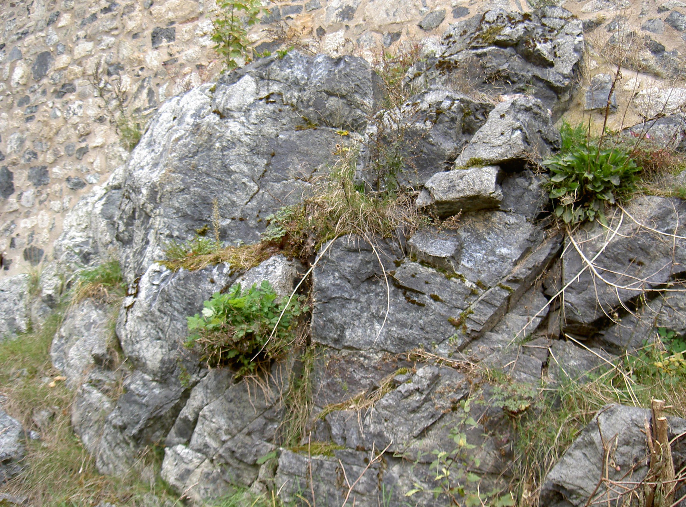 Serpentinitfelsen Schlossberg Waldau